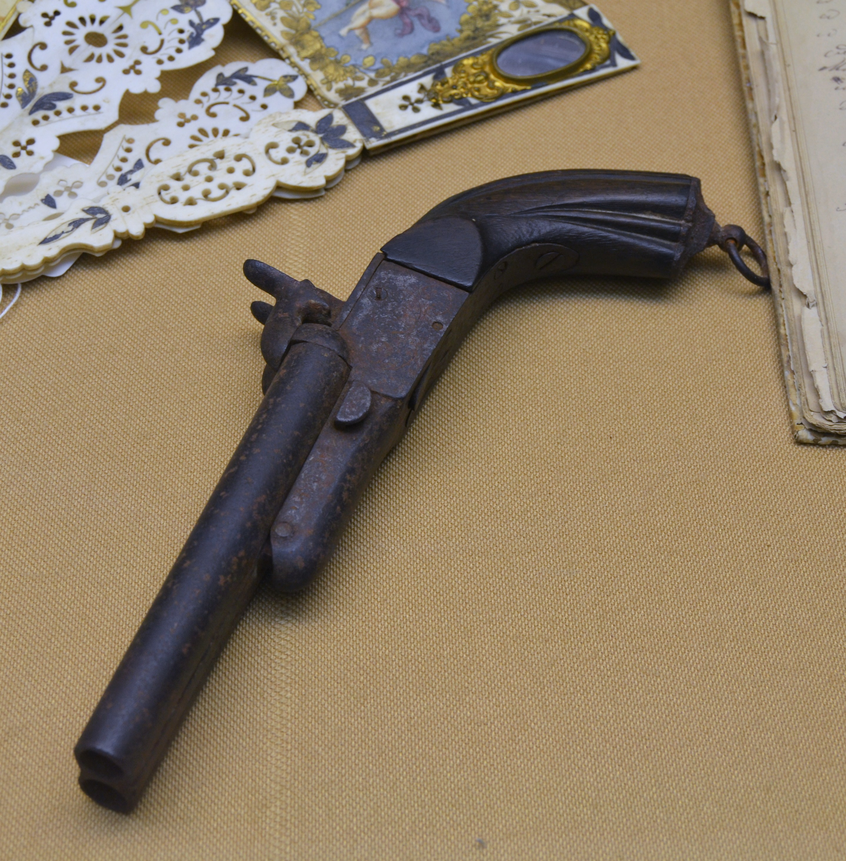 Pistola de dos canons per a bales del sistema Lefaucheux de la fàbrica de P. T. Juaristi d'Eibar (1881-1897), procedeix de la Vila de Xàbia. Museu Soler Blasco de Xàbia.